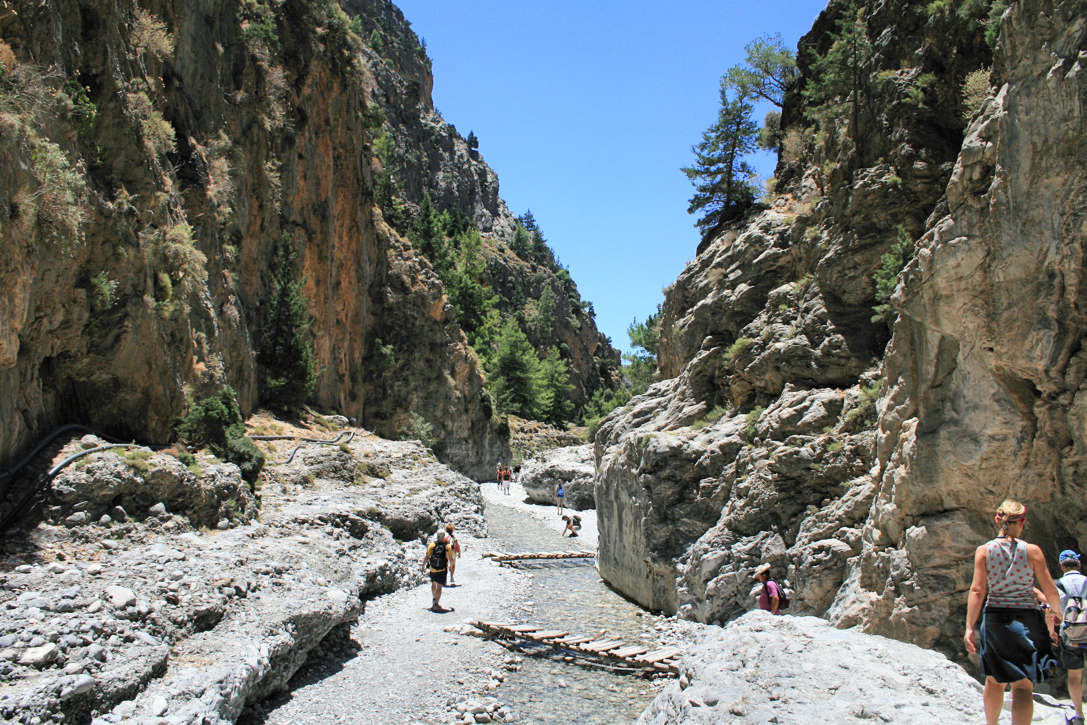 Wanderweg durch die Samaria-Schlucht auf der Insel Kreta